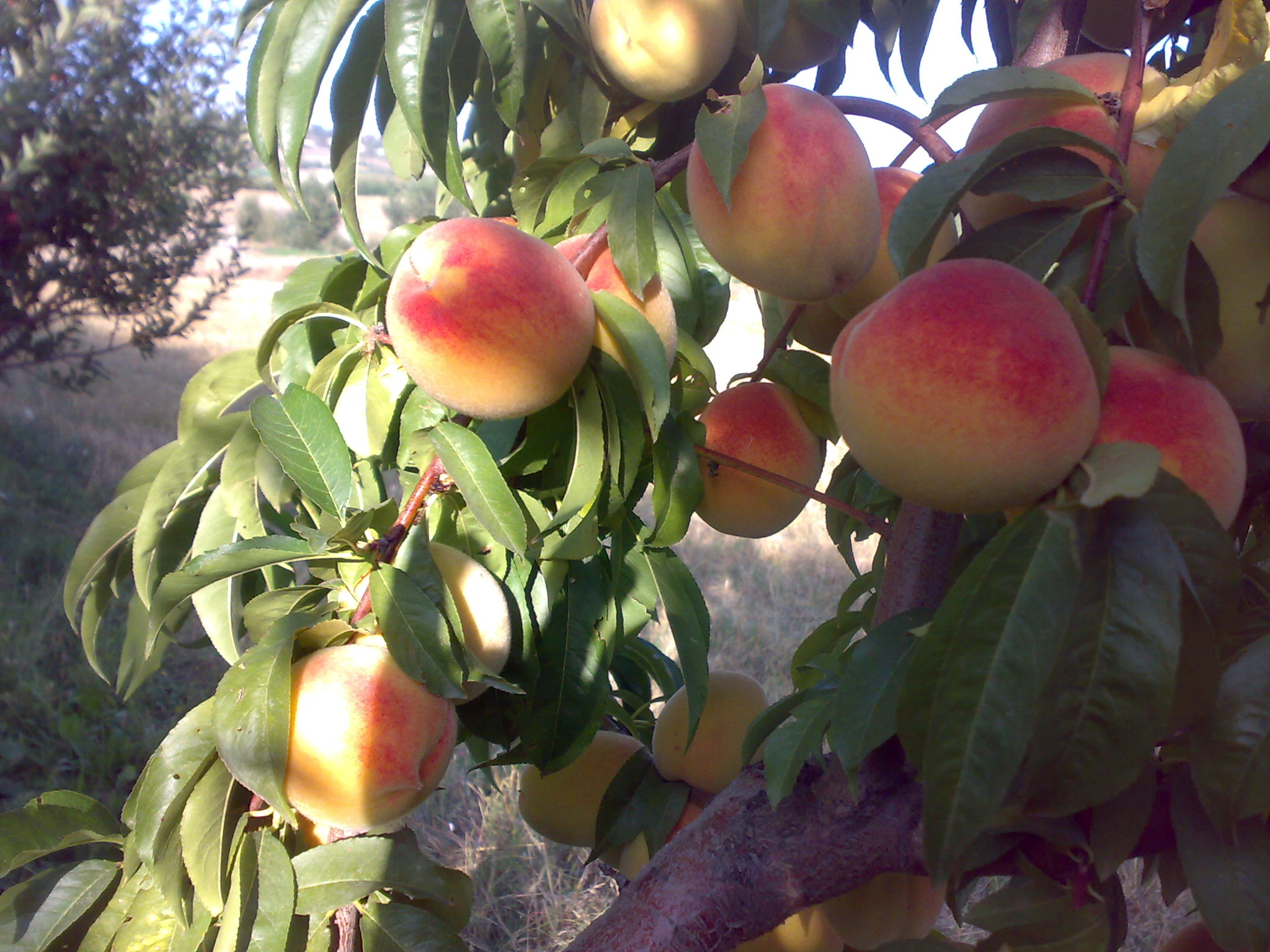 محصولات